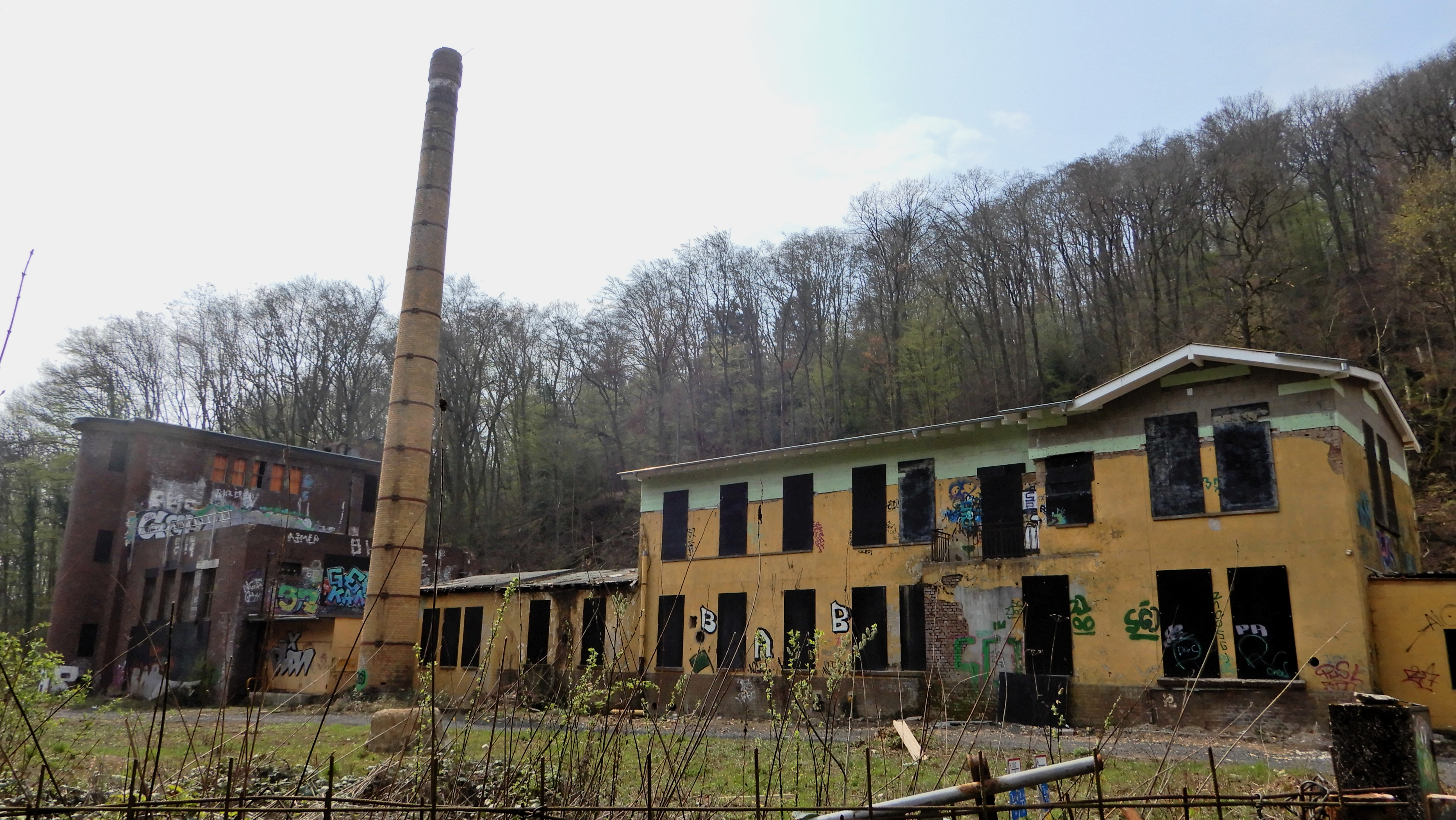 Wäscherei Mesenholl im Schmelztal, Schmelztalstraße 39, Bad Honnef